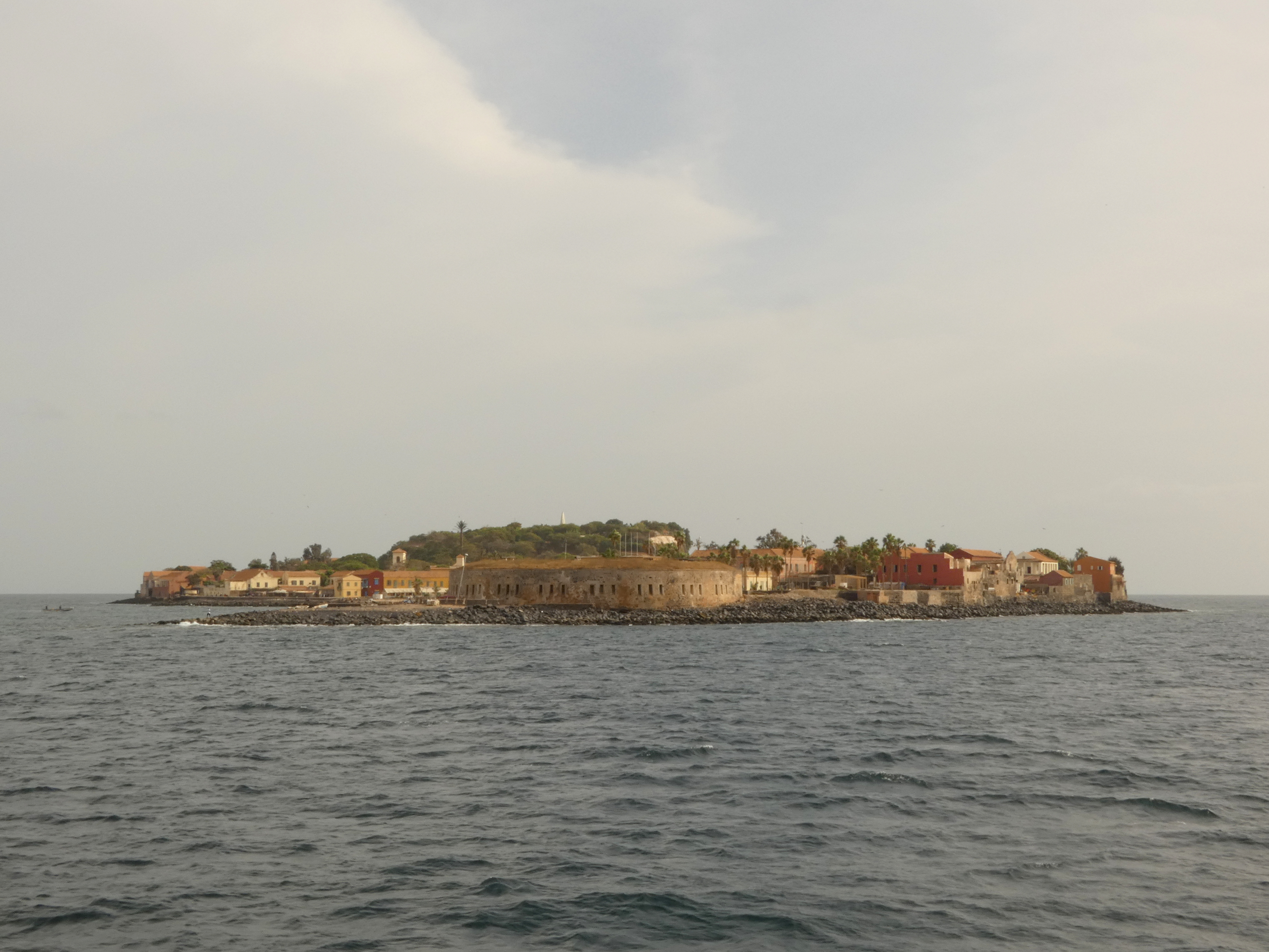 Île de Gorée